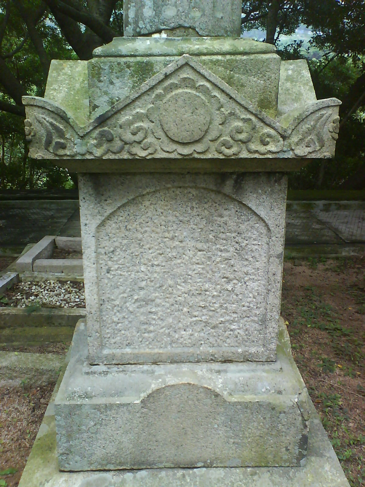 楊衢雲墓